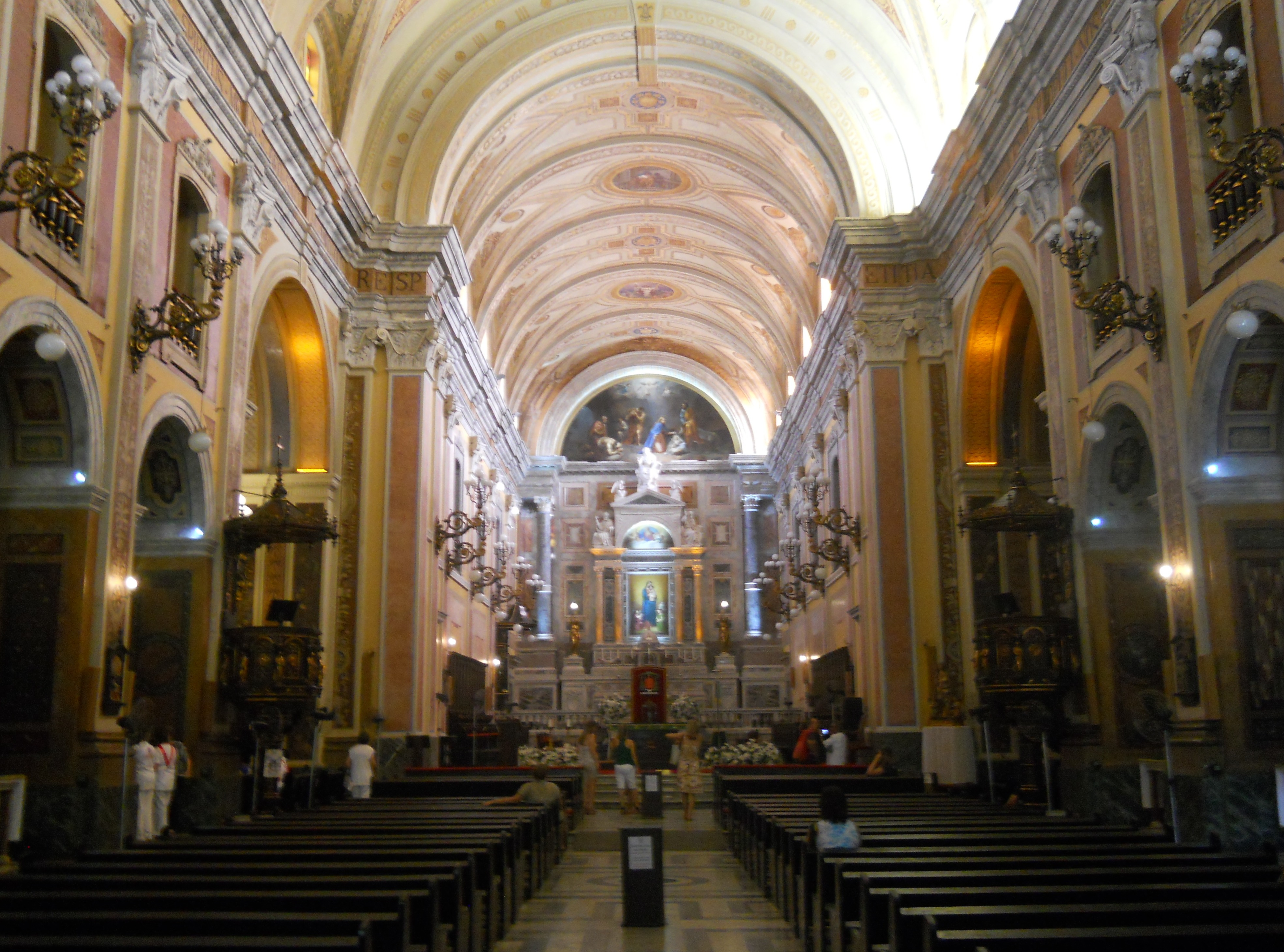 Igreja da Sé